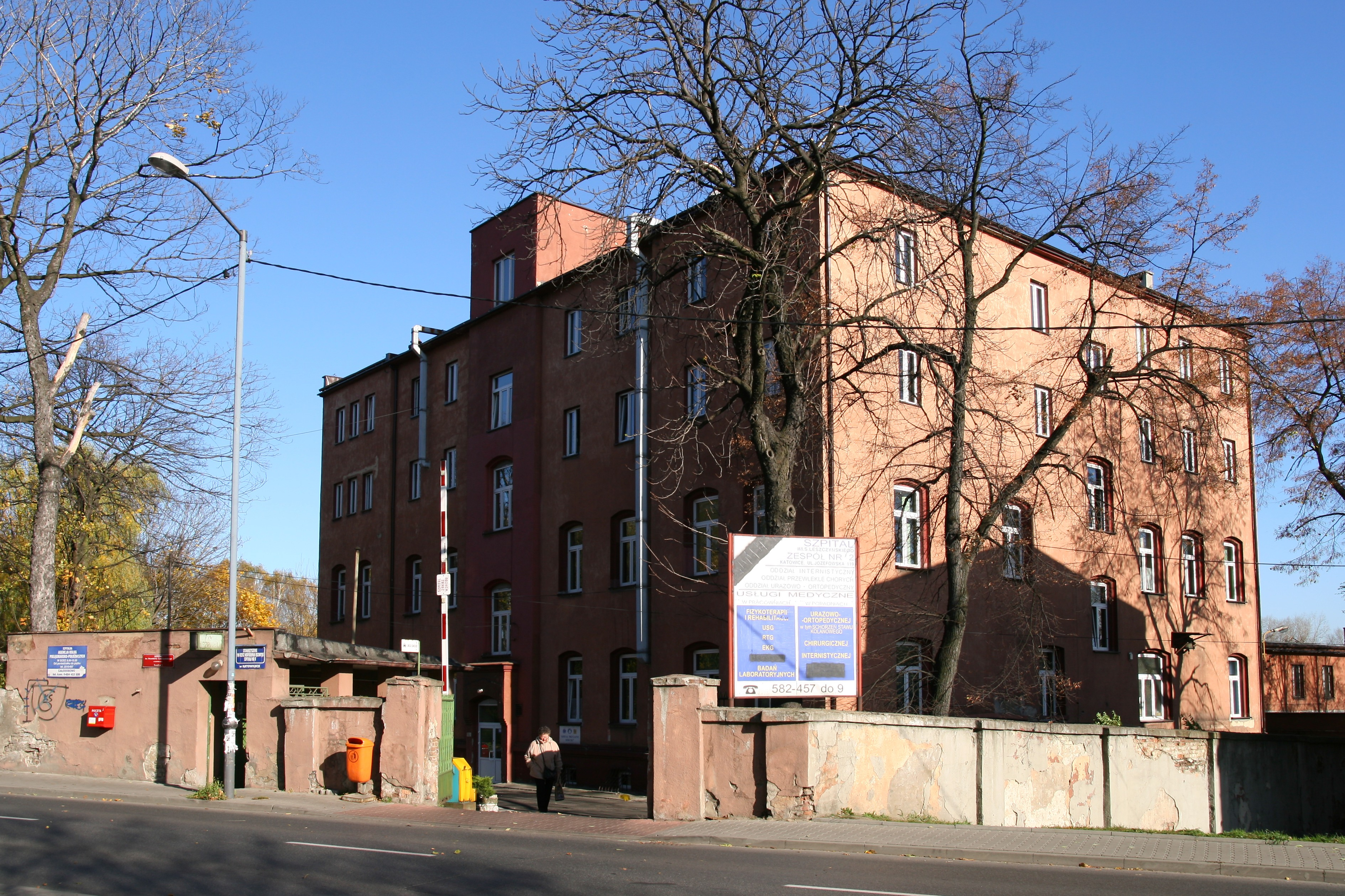 Szpital im S. Leszczyńskiego Zespół nr 2 przy ul. Józefowskiej 119 w Katowicach.